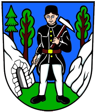 Znak Bruntálu, města v České republice. Blason: V modrém štítě údolí mezi dvěma skalami porostlými zelenými stromy, v pravé skále ústí štoly. Uprostřed stojí na zeleném trávníku horník v černém kabátci a čapce, ve stříbrných kalhotách. V levici drží přes rameno položený špičák, ve spuštěné pravici klín, obojí přirozených barev.